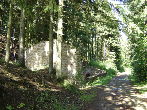 Kueleschapp. Allgemenges zum Bild: Dëst Bild weist den Kueleschapp vu der fréierer Miniéresbunn um Bielesser Gaalgebierg.